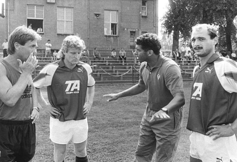 ADN-Fritz-Gahlbeck-31.7.90-Leipzig: Fussball-Fusion Gleich nach der Gründung des FC Sachsen Leipzig 1990 e.V. ging man zur Tagesordnung über und bestritt unter Trainer Jimmy Hartwig (M.) das erste Spiel gegen den FH Chemnitz. Kurze Einweisung im Heimstadion vor dem Spiel. Die neue Oberliga-Mannschaft ging aus dem FSV Böhlen und dem FC Grün-Weiß hervor.